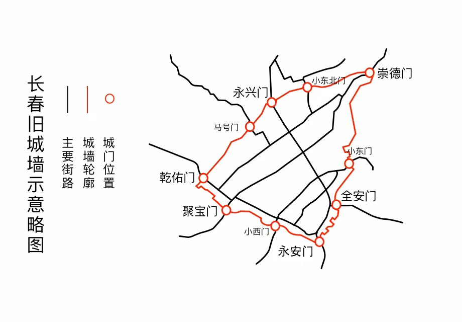 Defensive wall of Changchun(back then, Kuanchengzi) in late 19th century.